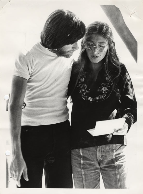 Liberación de presos políticos de "Tres Álamos". Tres Álamos fue un campamento de prisioneros políticos que funcionó por orden del Régimen Militar en Chile.